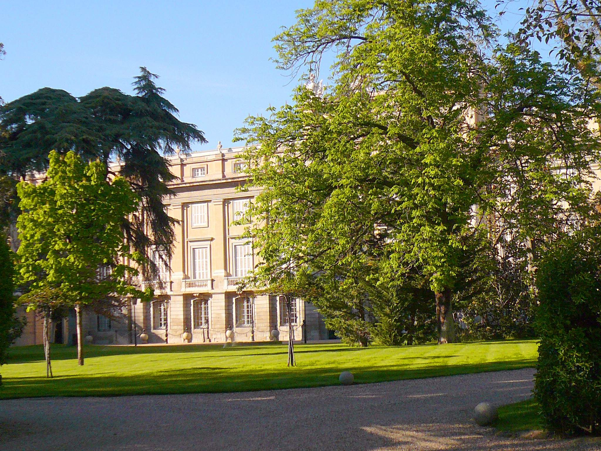 Madrid - Entrada al Palacio de Liria